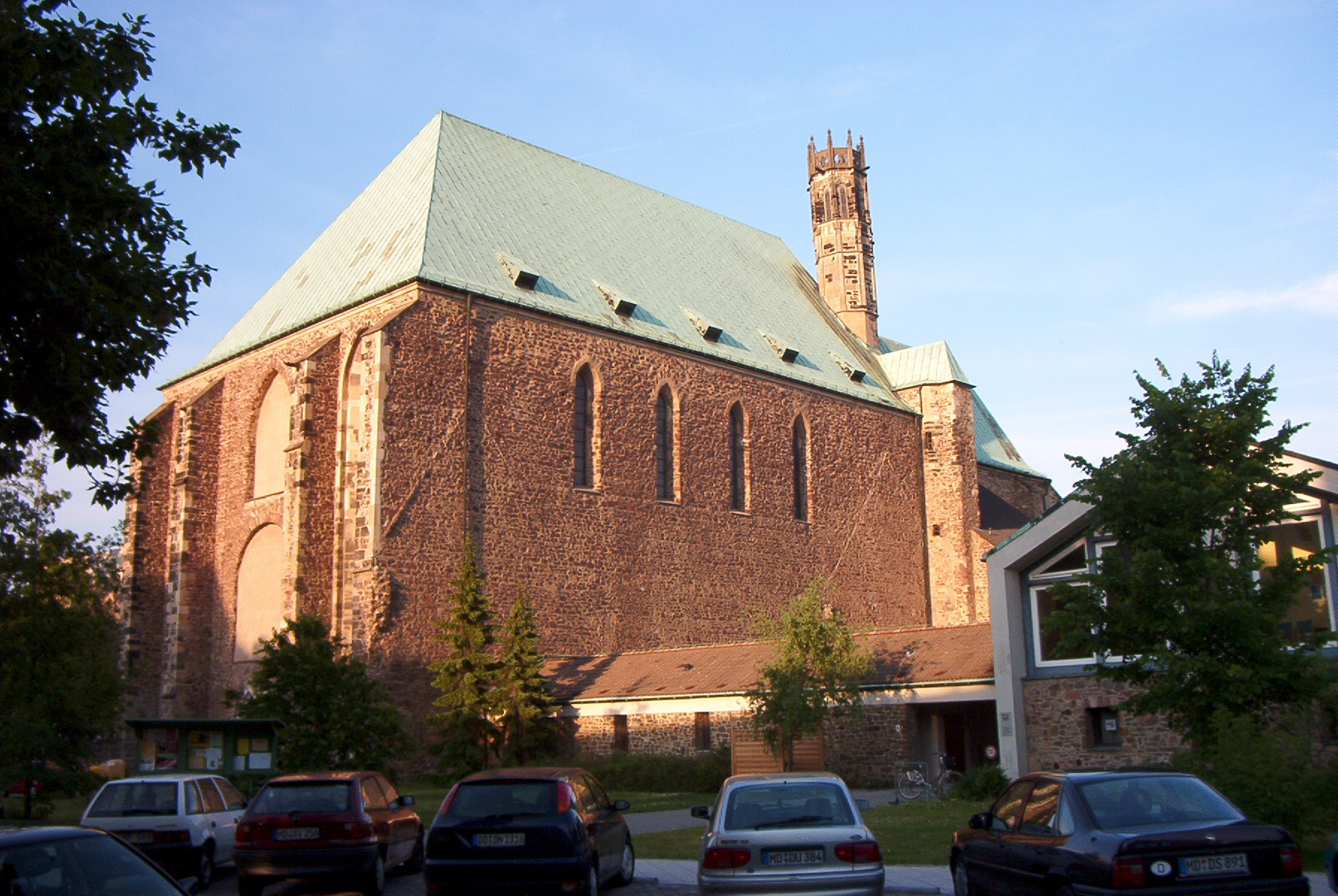 Wallonerkirche in Magdeburg